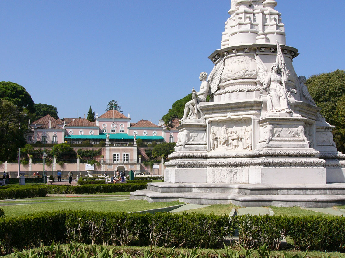 Afonso de Albuquerque Square and Belém Palace, Lisbon